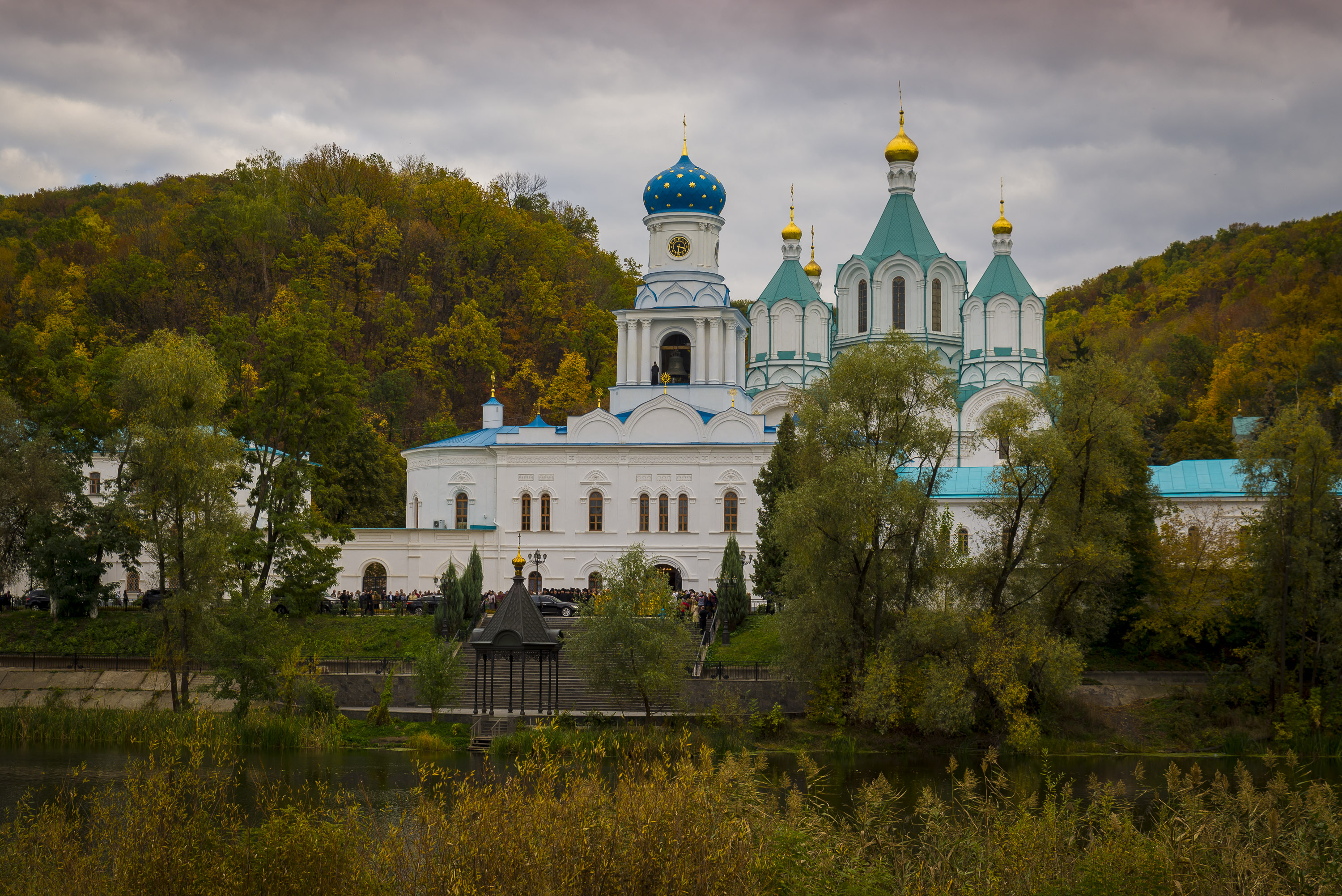 Трапезна церква з дзвіницею, Святогірськ, вул. Зарічна, 1